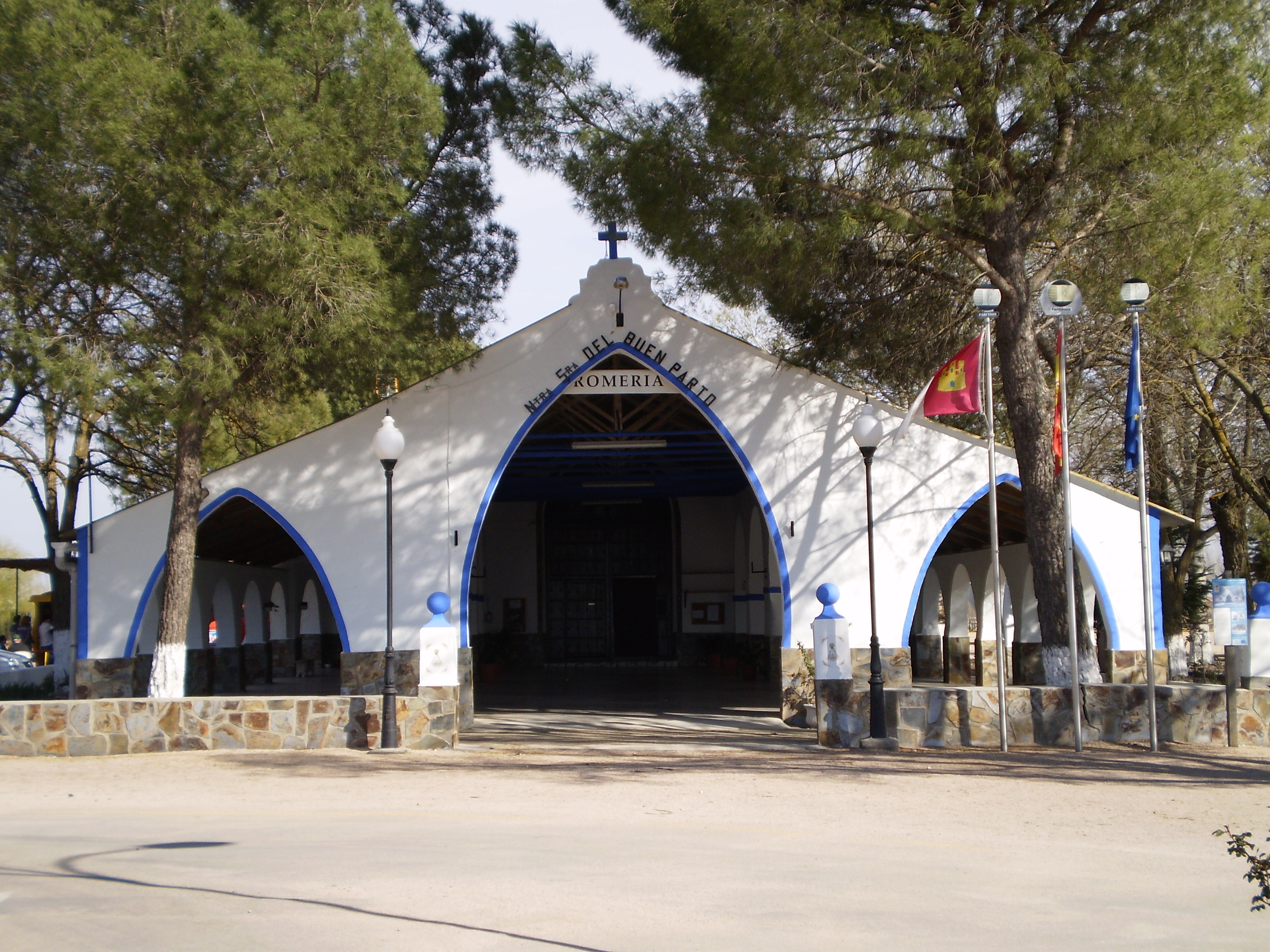 La ermita de la Virgen del Buen Parto de Pedro Muñoz.